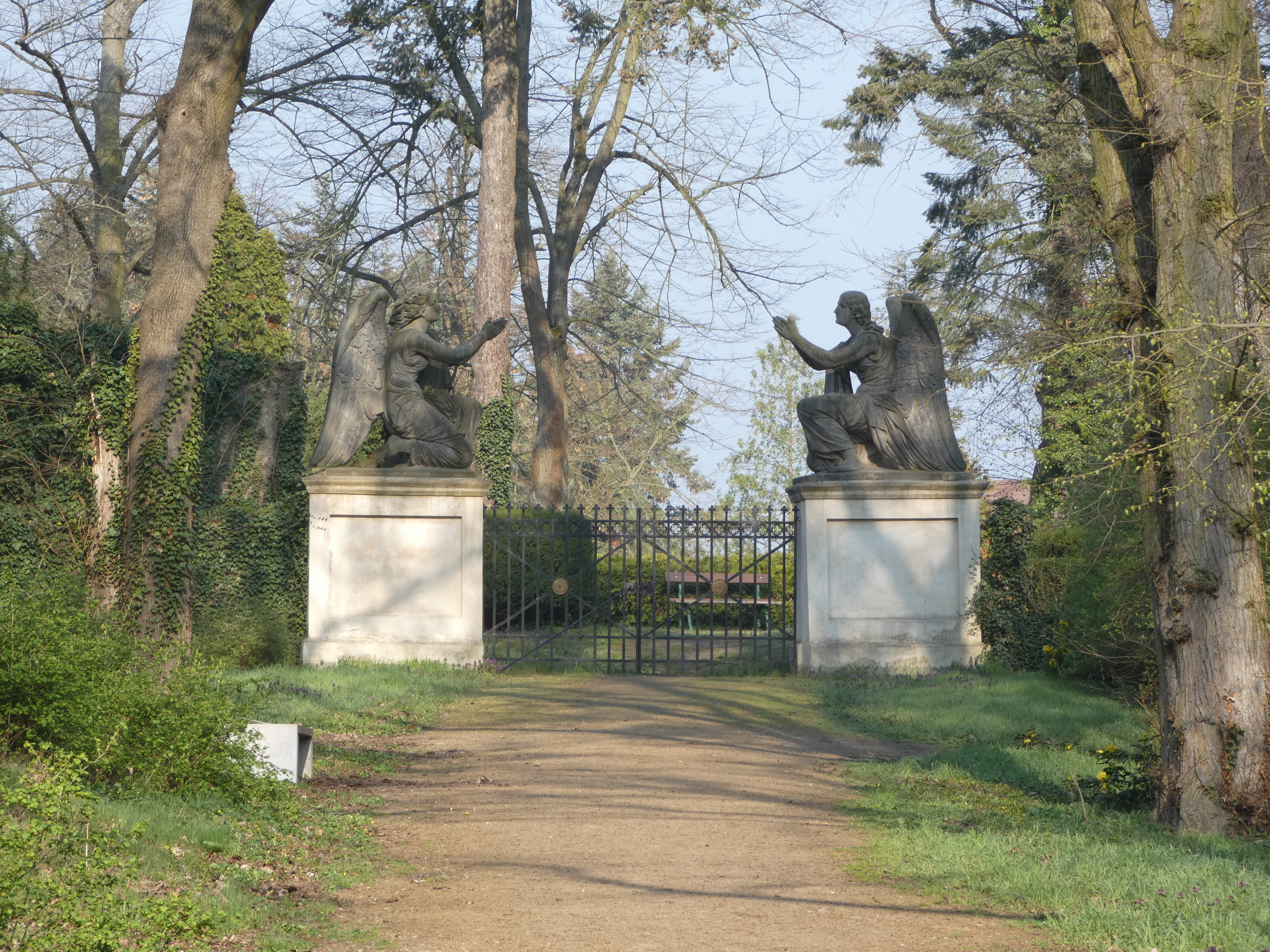 Das Engelstor zwischen Schlosspark und dem Kirchhof in Plaue